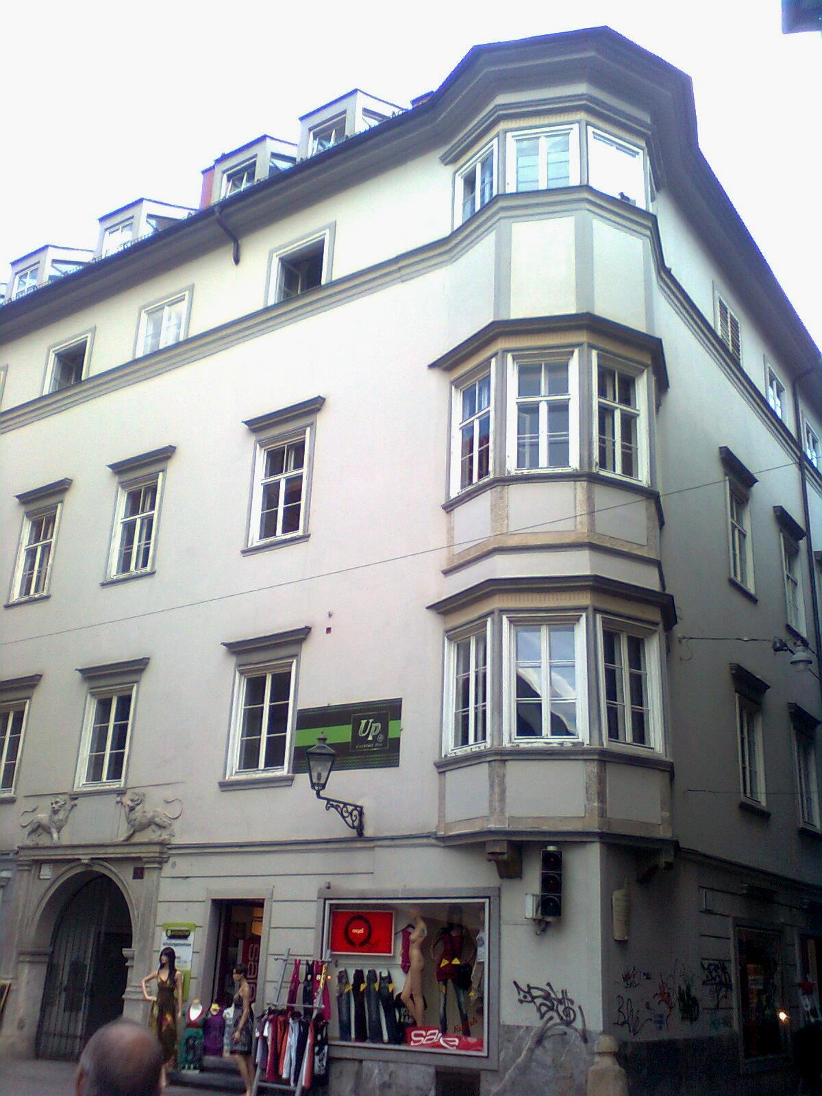 Außenansicht des Palais des Enffans d´Avernas am Grazer Glockenspielplatz